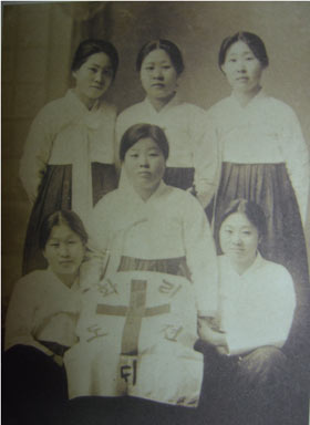 이화전도대